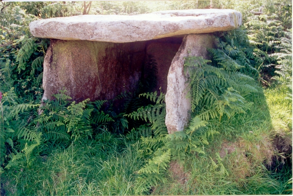 "Casota de Freán", en Berdoias, Vimianzo - posíbel anta